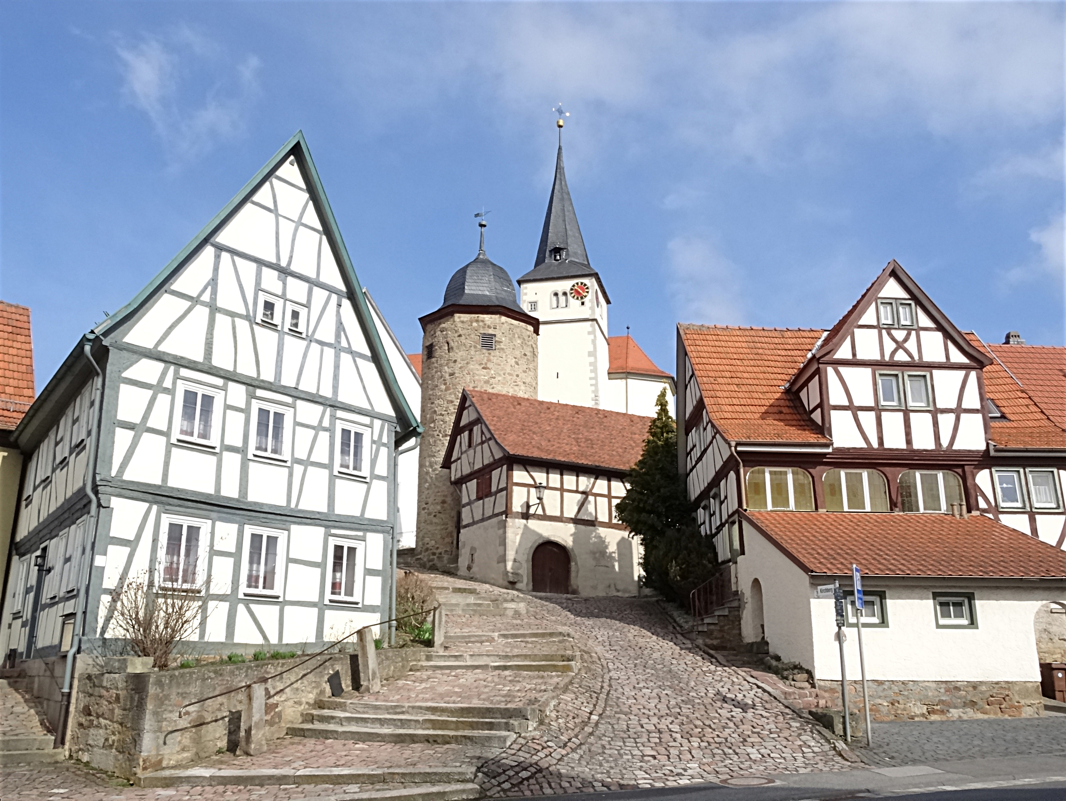 Kirchaufgang in Nordheim vor der Rhön